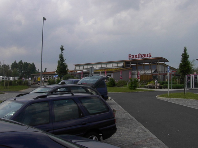 高速公路服务区 (德国) (DF08 (中文) 2003年图片)